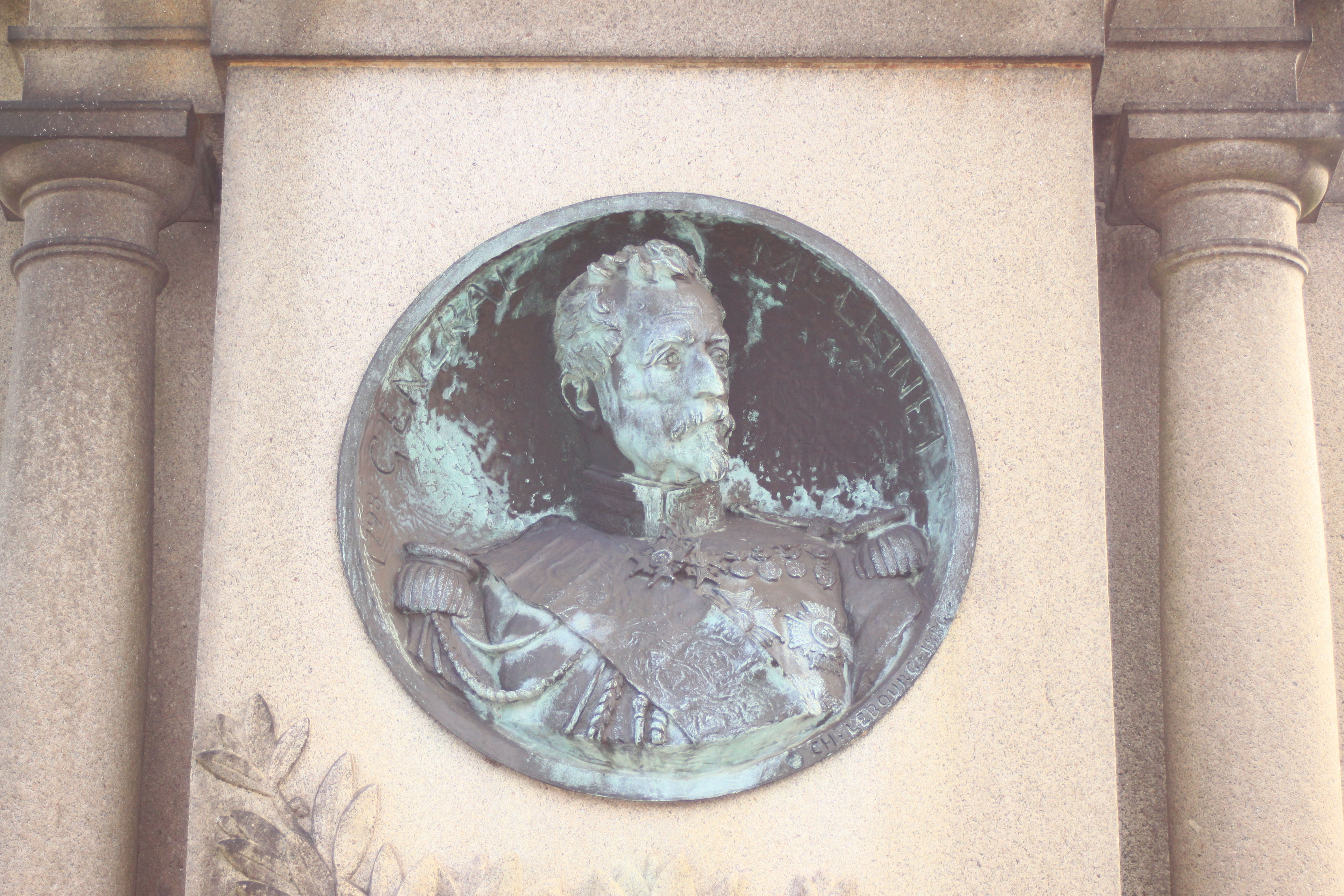 Médaillon du Général Mellinet, réalisé par C. Lebourg, cimetière de la Miséricorde, Nantes.